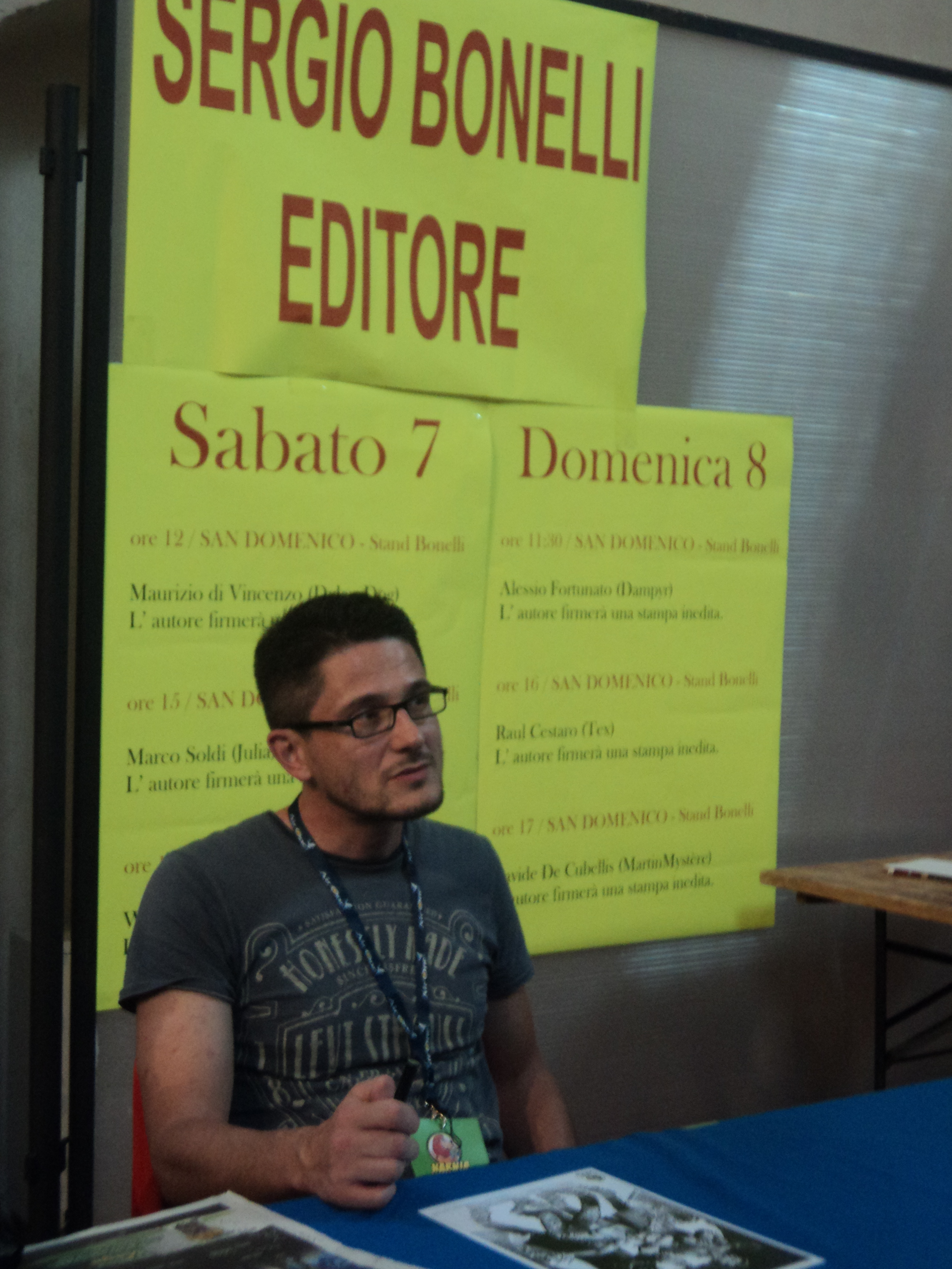 Marco Santucci a Narnia Fumetto 2013